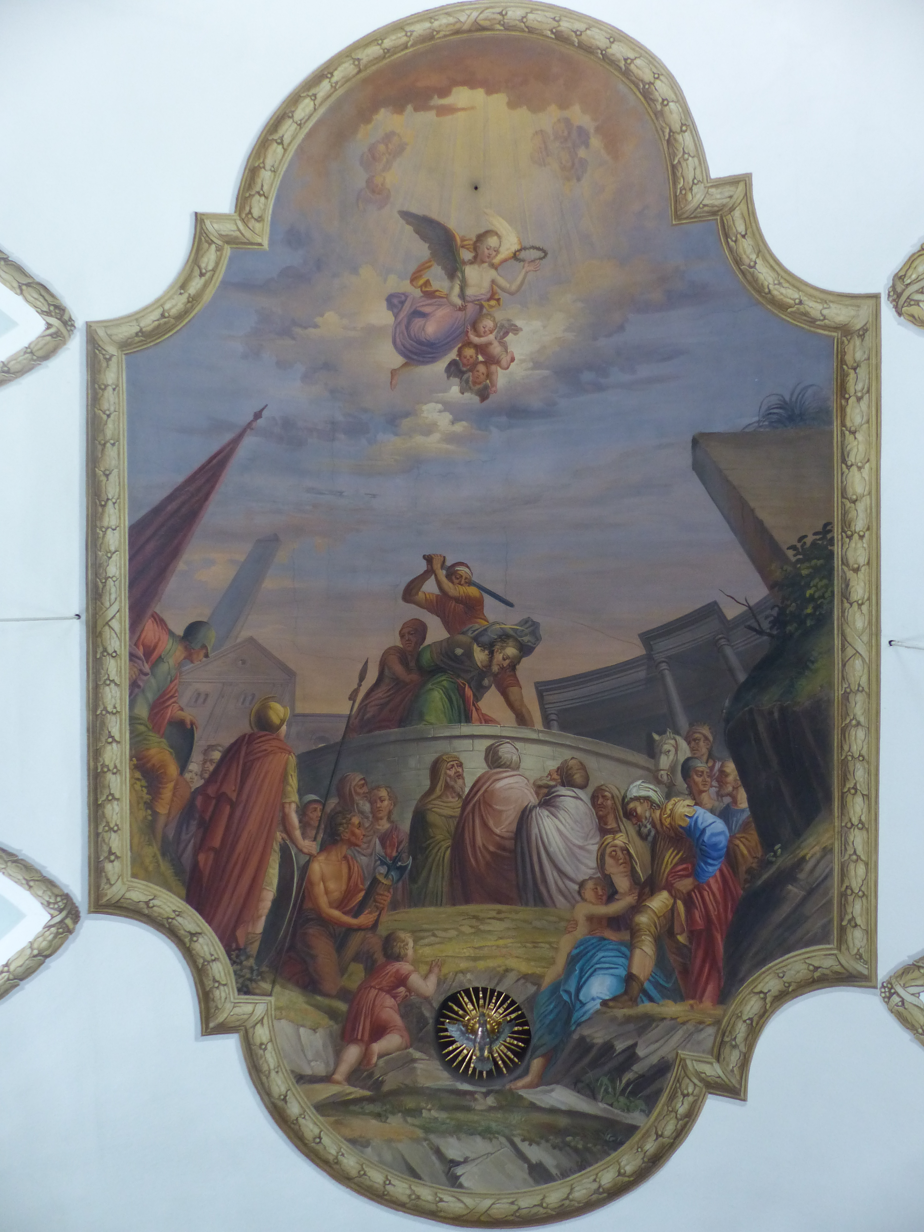 Deckengemälde in Pfarrkirche St. Jakob in Vent: Enthauptung des hl. Jakobus